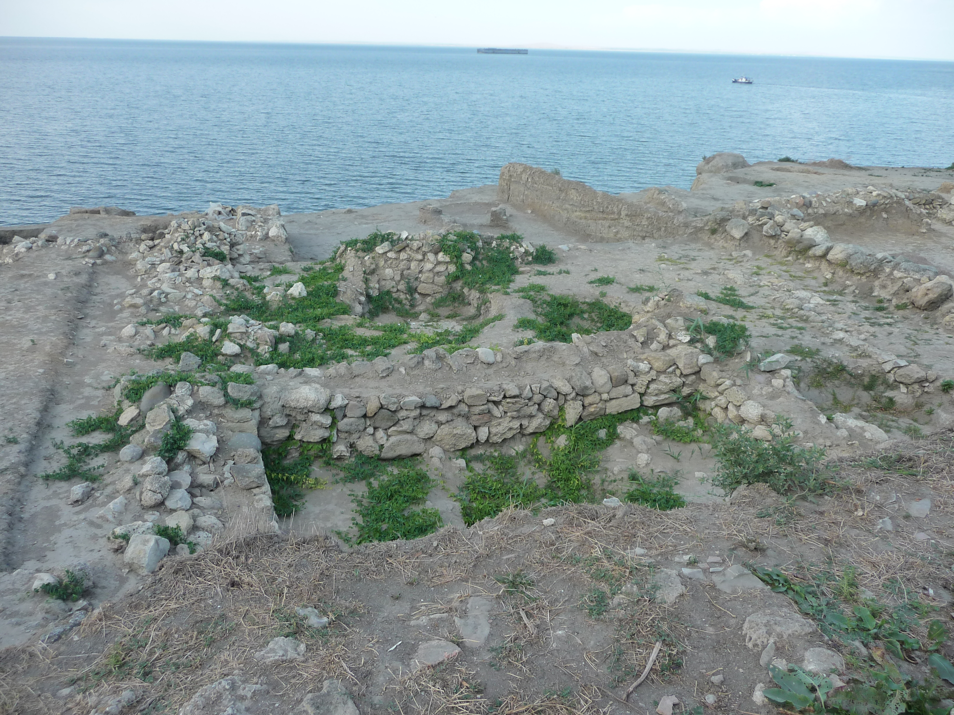 Раскопы Германассы